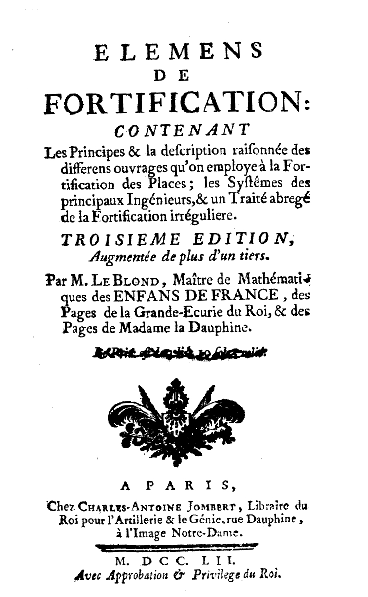 Frontespizio